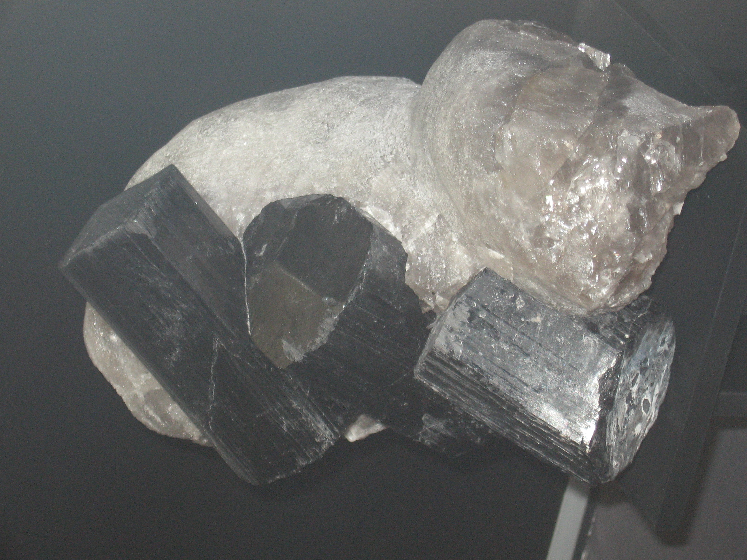 Sciorlite from Hambohimahavelona, Madagascar